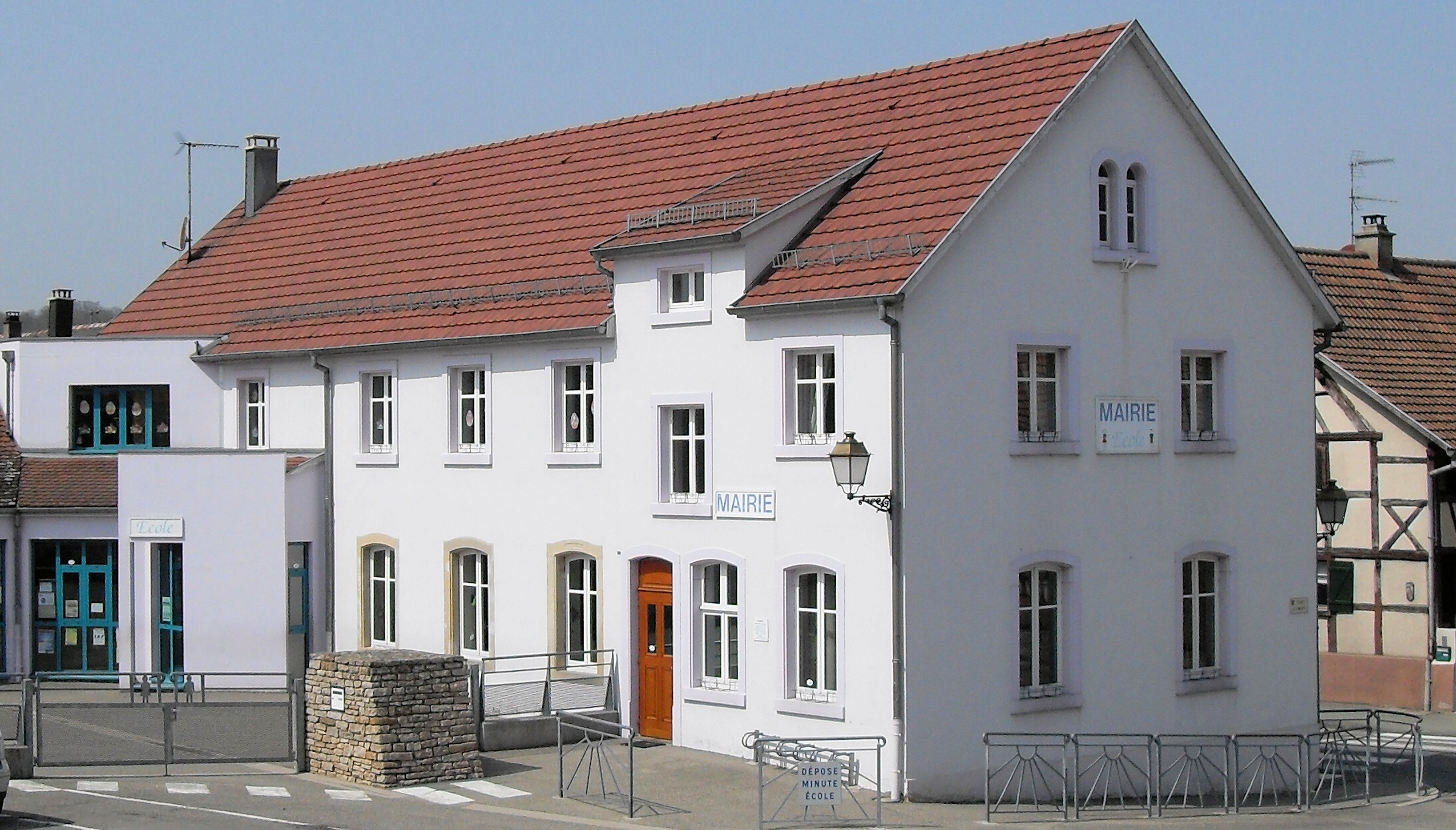 La mairie de Tagsdorf